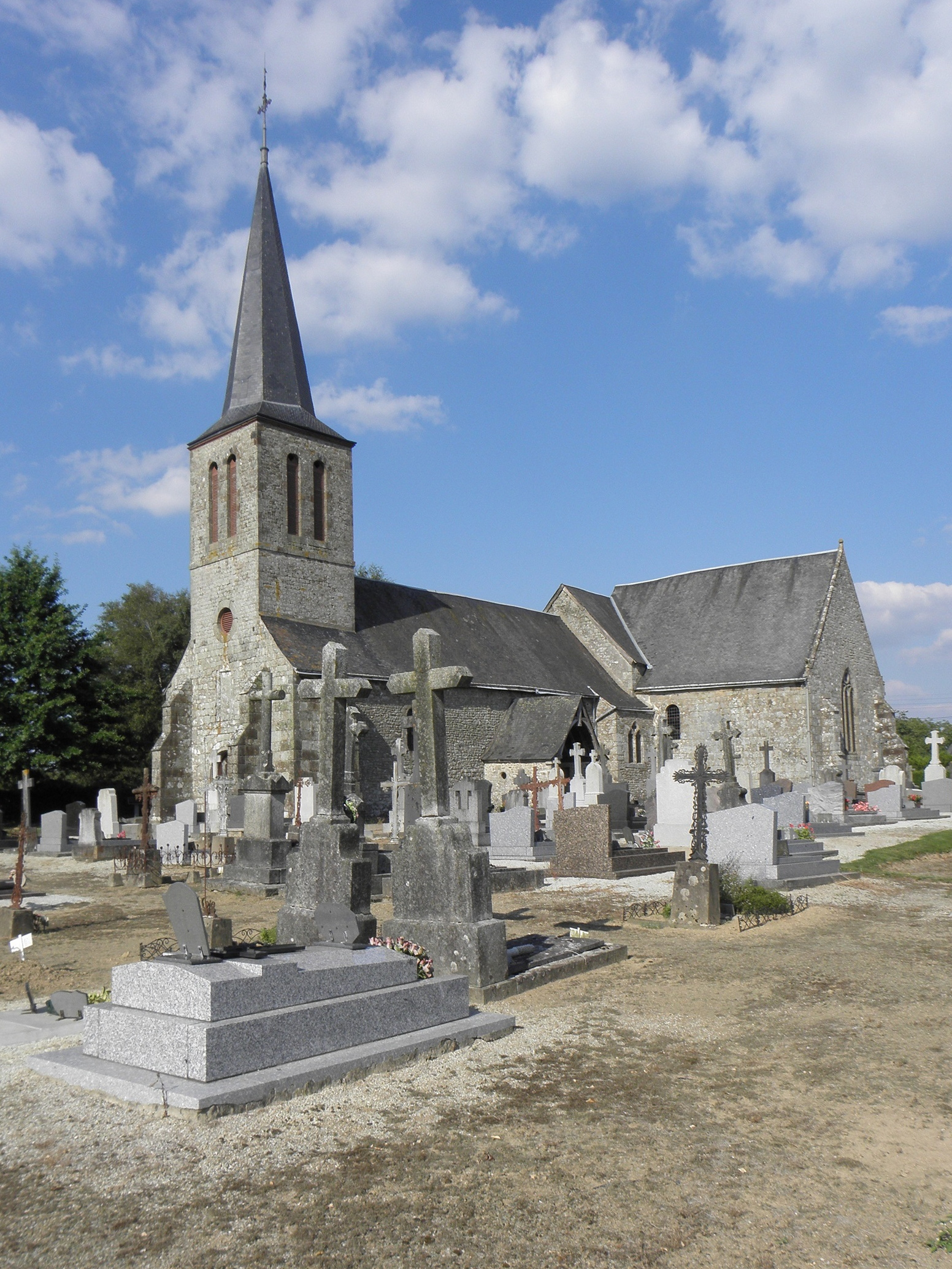 Façade occidentale et flanc sud de l'église de Saint-Berthevin-la-Tannière (53).